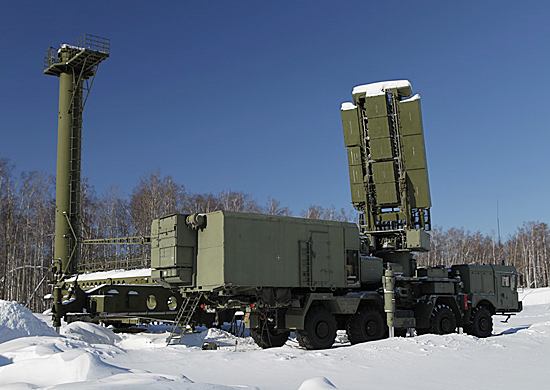 606-й Краснознаменный гвардейский зенитный ракетный полк (г. Электросталь, Московская обл.)